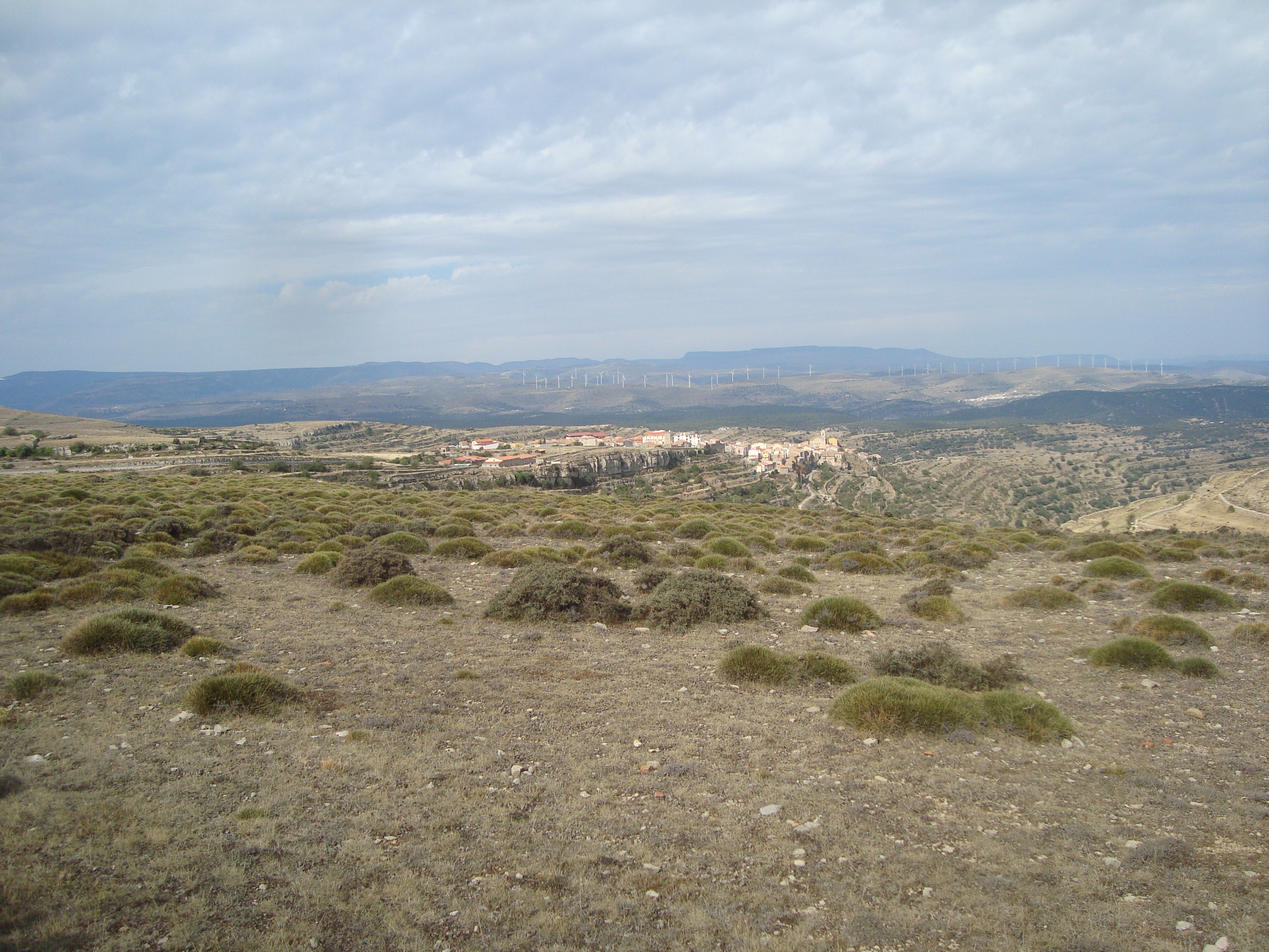 Castellfort, vista panorámica